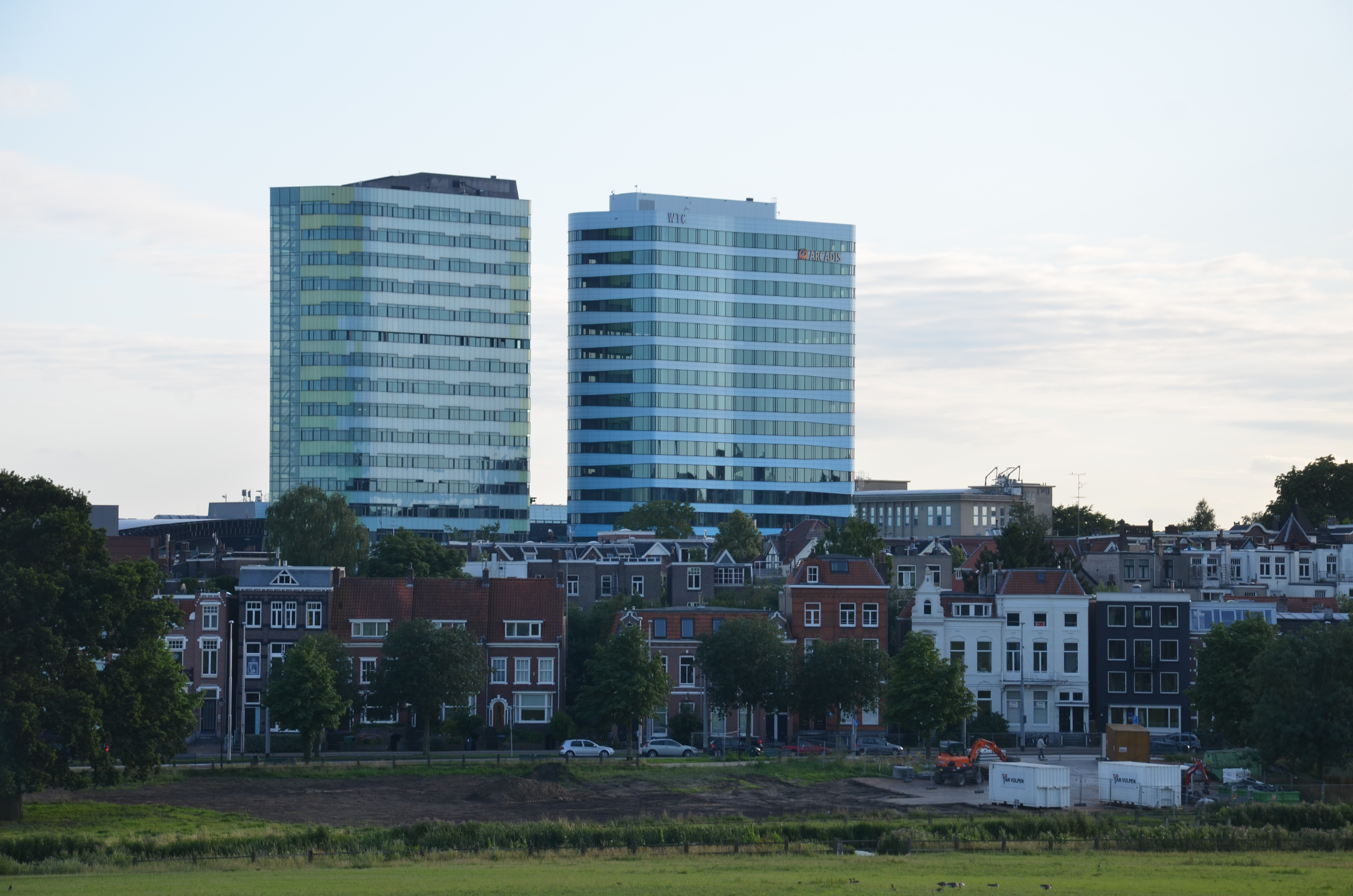 World Trade Center in Arnhem.